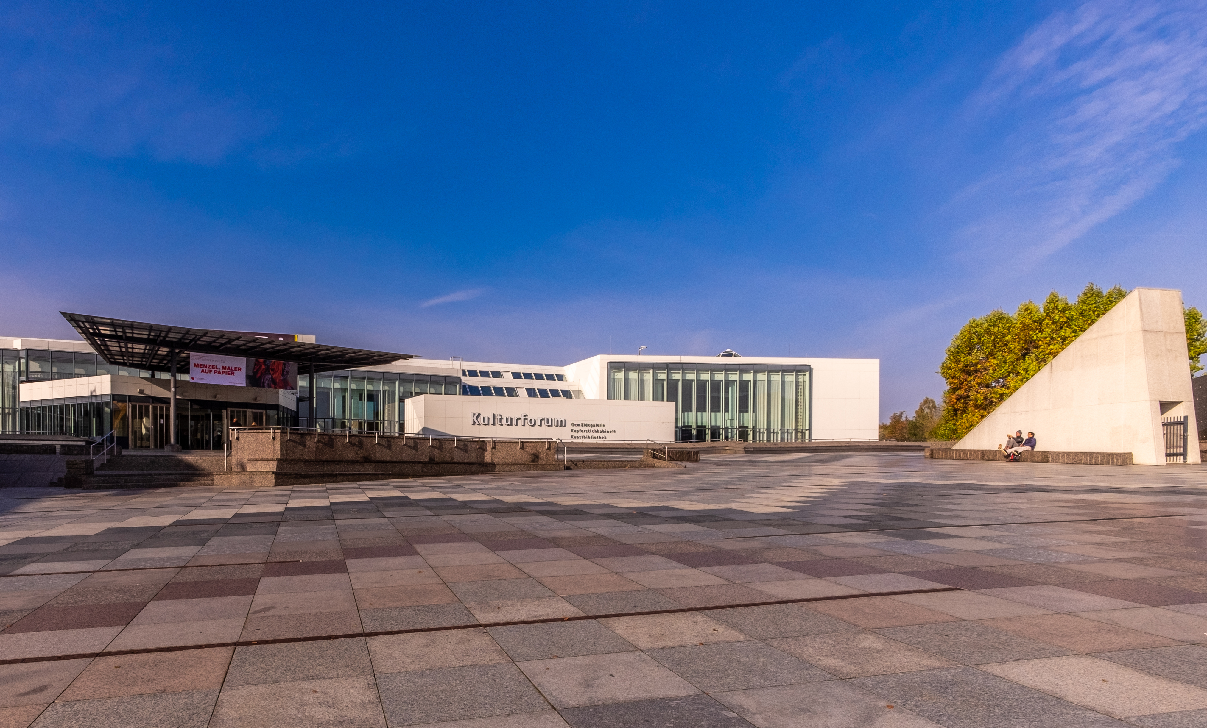 Kulturforum Berlin, Haupteingang